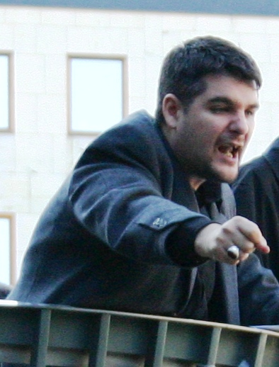 På reklamen som spridits via nazistiska hemsidor kallades demonstrationen "antijudisk". Själva ville de hellre titulera sig som antisionister. Demonstrationen arrangerades av Al Quds-kommittén och lockade mestadels muslimer, men också en handfull nationaldemokrater och nynazister. Talare var Mohammed Omar och Lasse Wilhelsson, båda förintelseförnekare. Demonstrationen omringades av motdemonstranter som skanderade slagord, och polisen fick spärra av en stor del av torget samt stänga av Klarabergsgatan på grund av den stora folksamlingen. Några personer fick omhändertas efter att de kastat bland annat ägg mot demonstrationen, som avslutades vid 16-tiden.